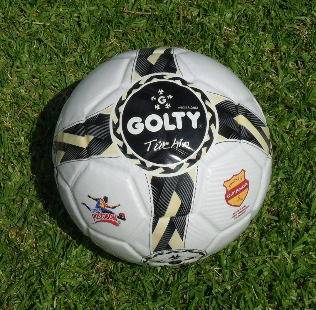 Balón Golty Tuchín usado en la Liga Postobón y Torneo Postobón 2011